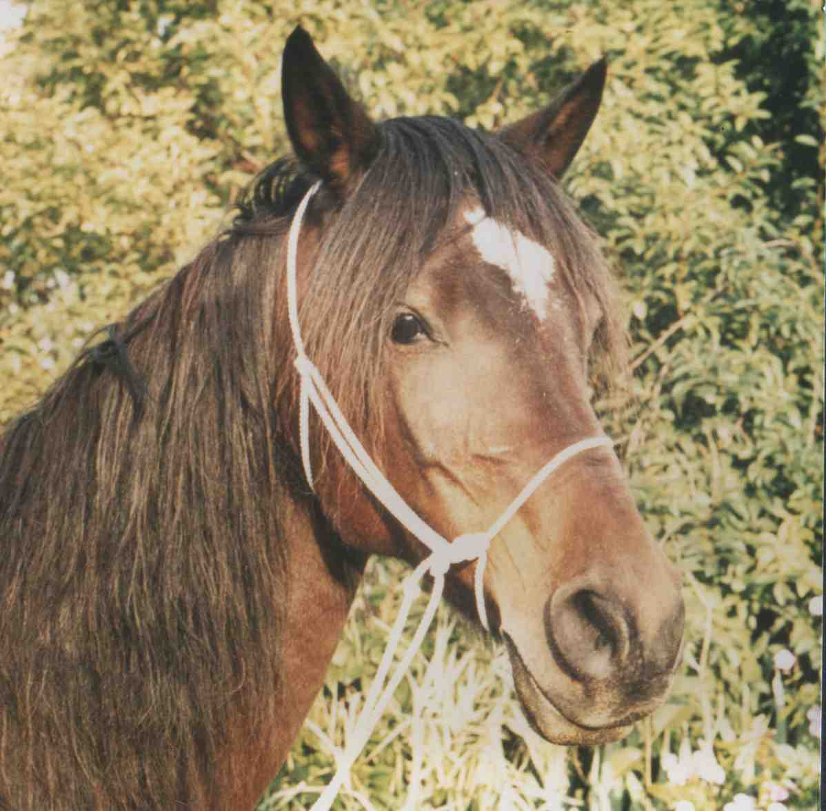 Pferd "El Hafi" mit Knotenhalfter als Zaumzeug zum Reiten und Anbinden.